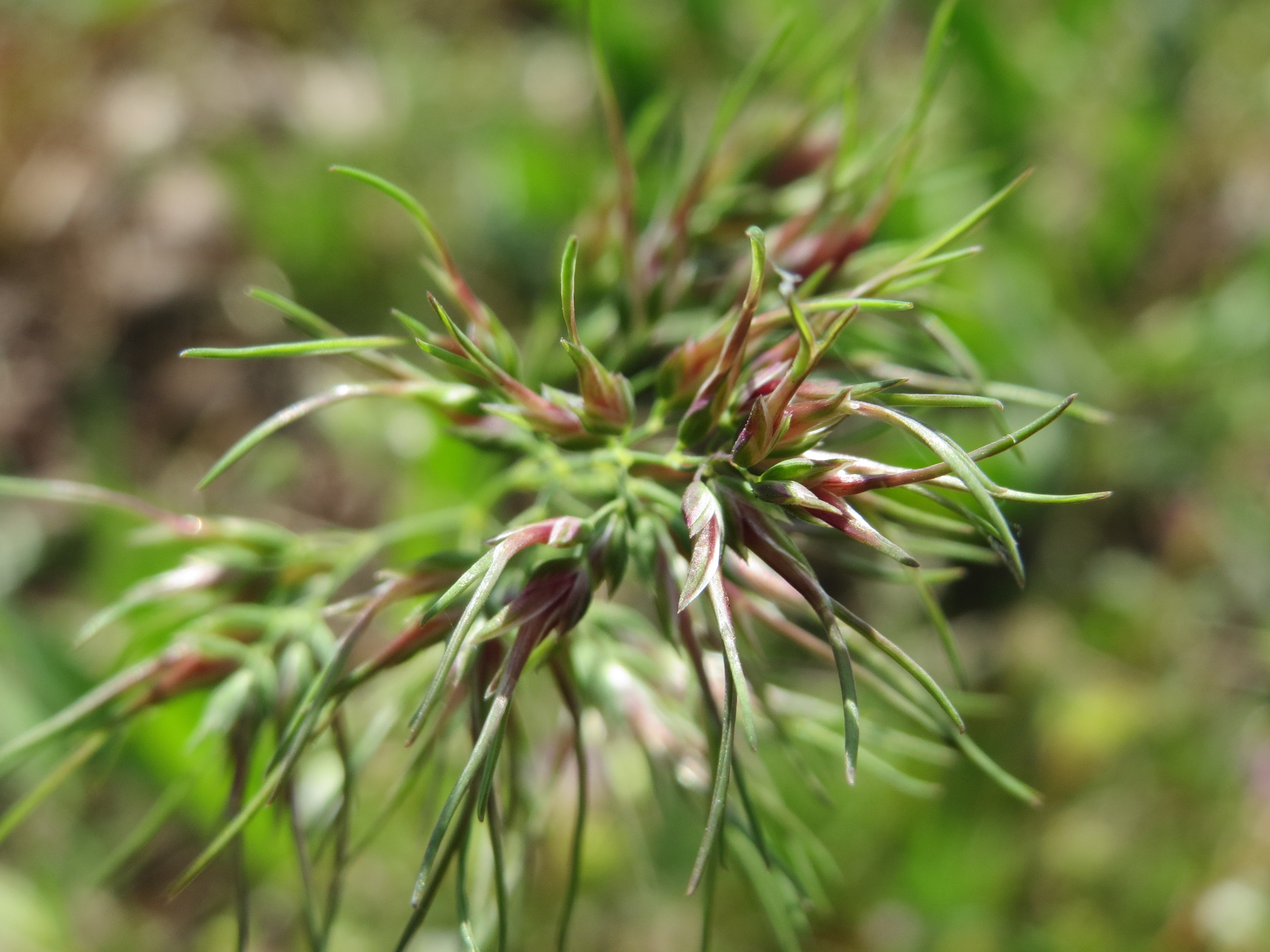 Zwiebel-Rispengras (Poa bulbosa) in Hockenheim